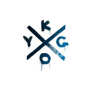 kygo imagen